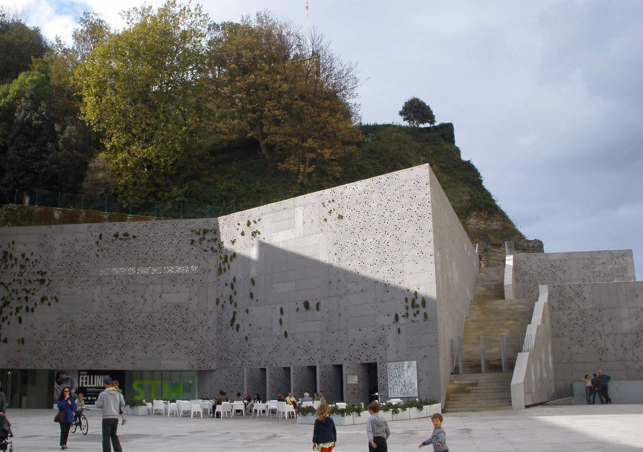 Museo y antiguo Monasterio de San Telmo (San Sebastián)